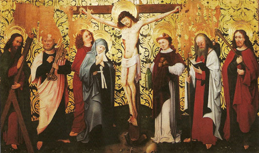 Le tryptique de la Passion